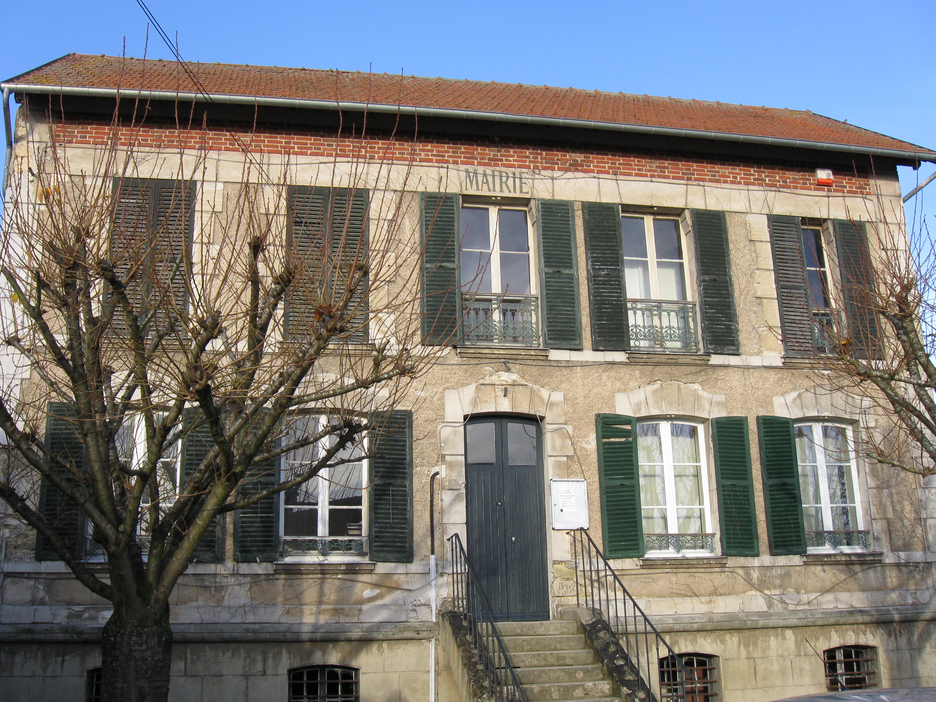 Mairie du Perchay (département du Val-d'Oise, région Île-de-France).